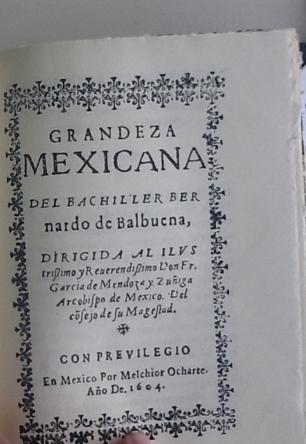 Portada de La Grandeza Mexicana de la edición de Melchior Ocharte